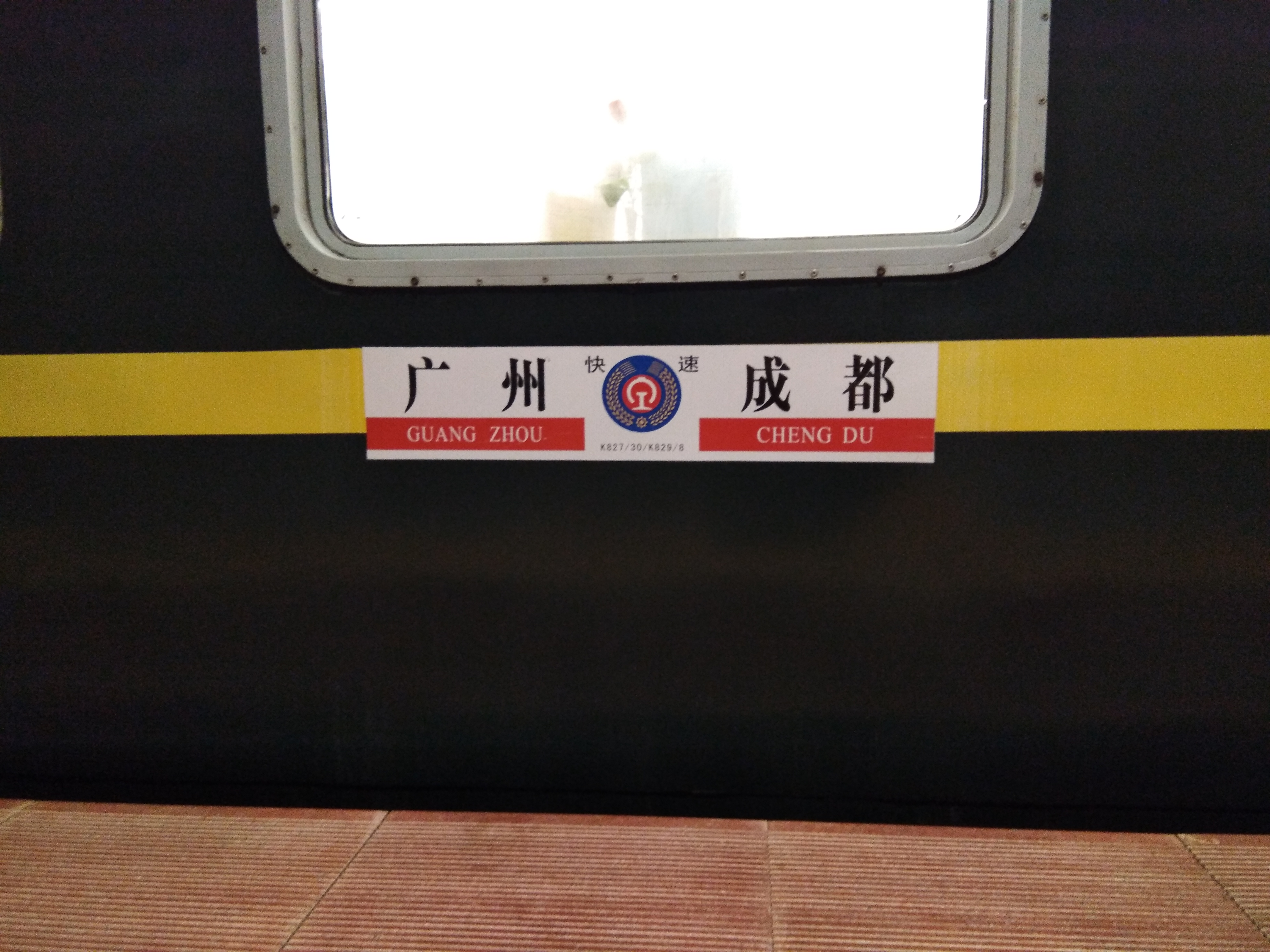 广州－成都K827/830、K829/828次列车水牌